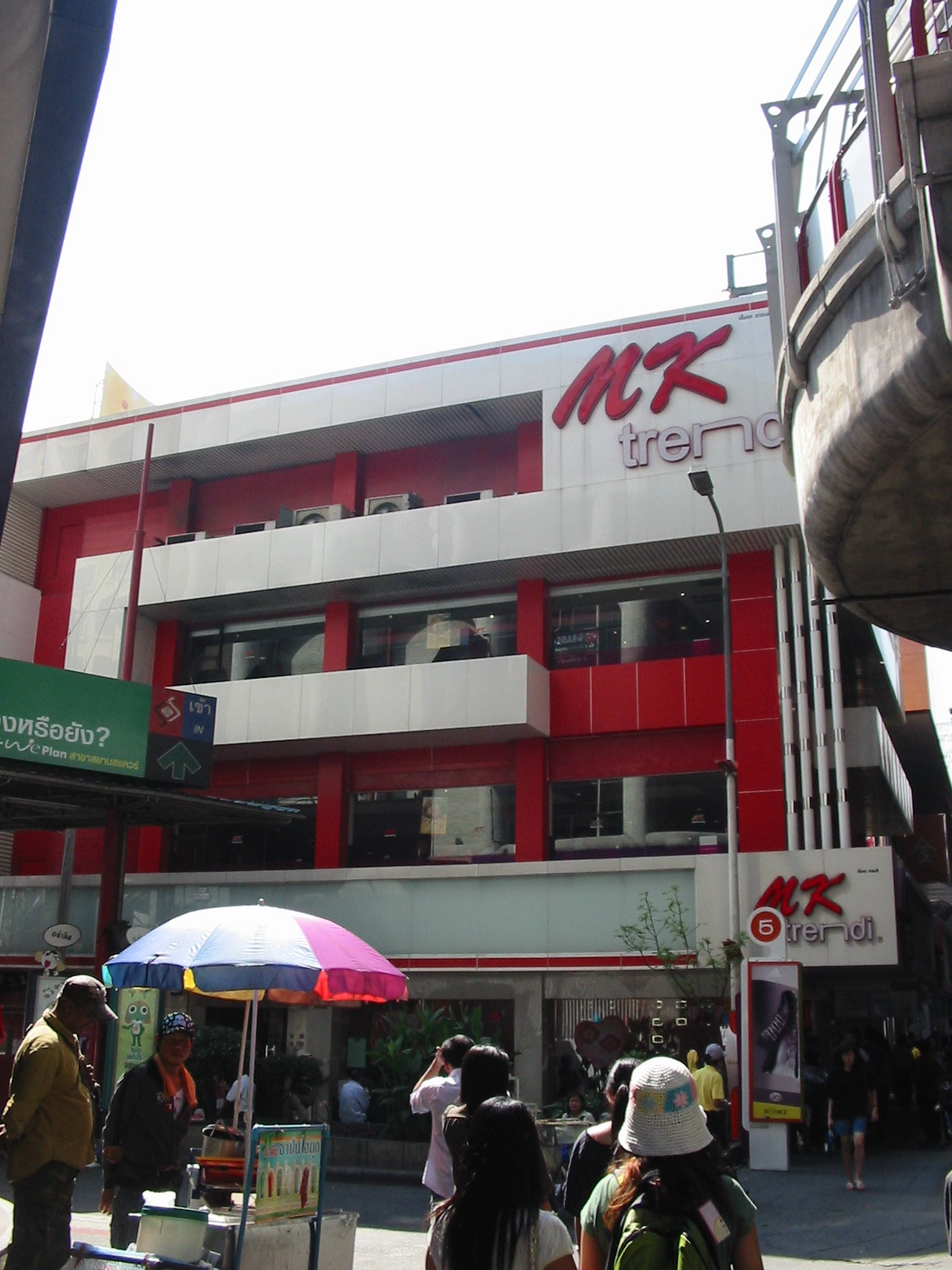 MK Suki at Siam Square